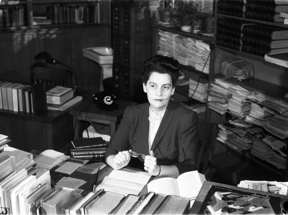 Hélène Grenier est assise à son bureau de la bibliothèque.